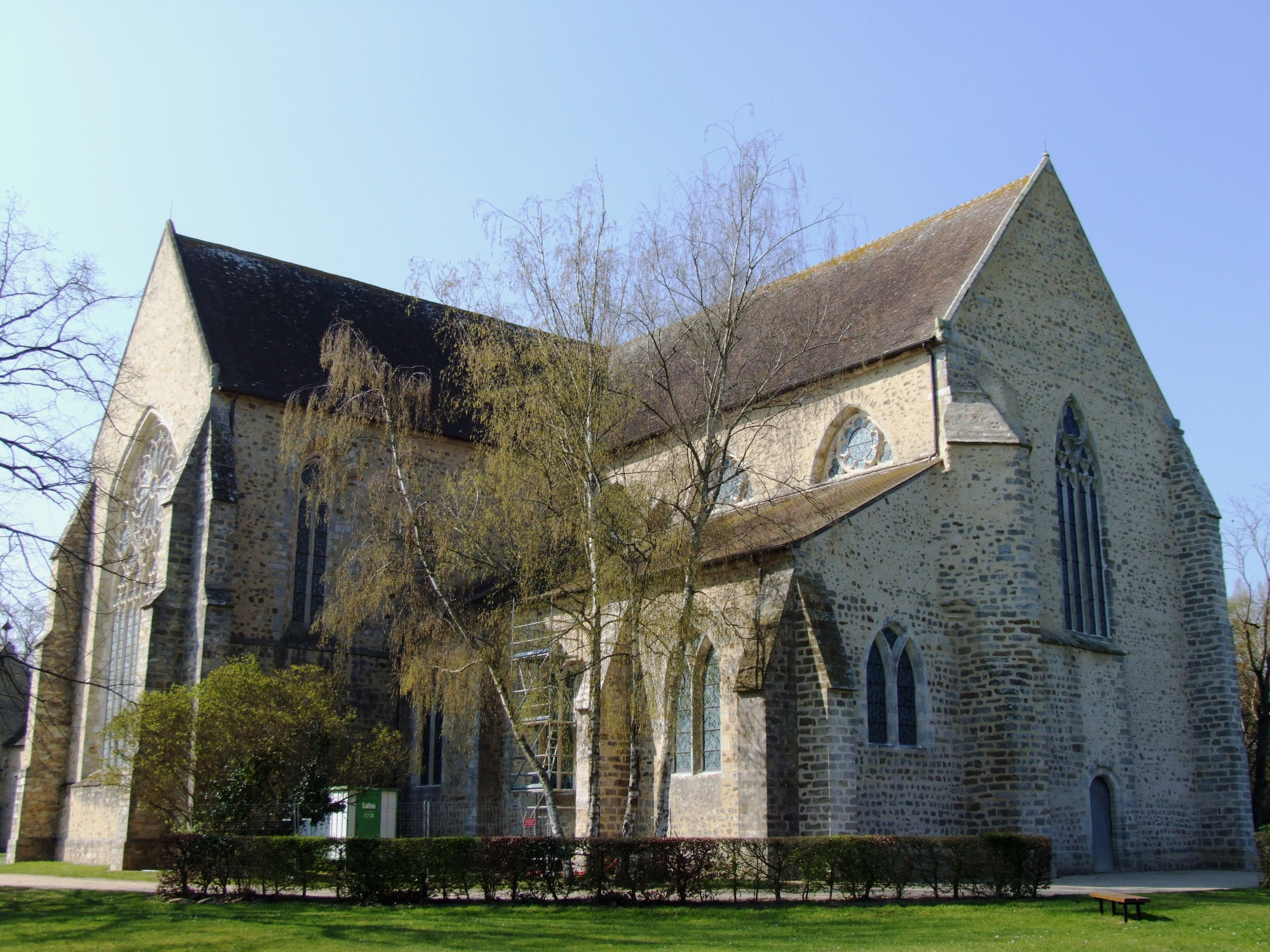 Abbaye de l'Epau - Abbatiale